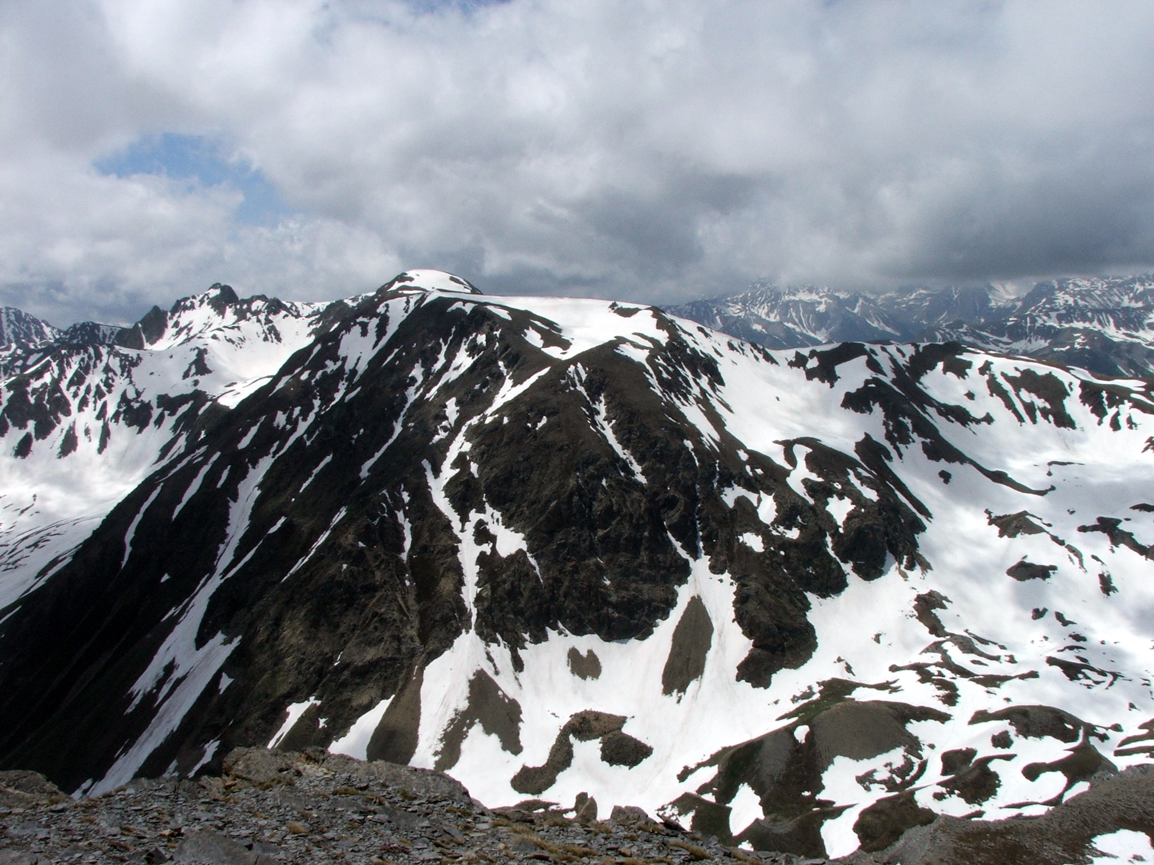 Foto della Cima del Bal, di Orobicon